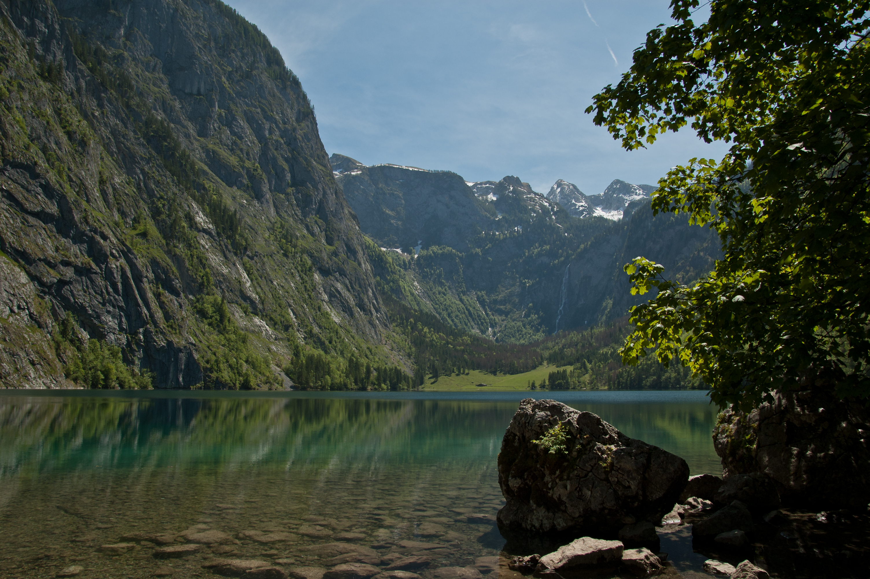 Blick über den Obersee auf die Fischunkelalm und die Talwand (links). Im Hintergrund am Ende des Talkessel der Röth der Röthbachfall.